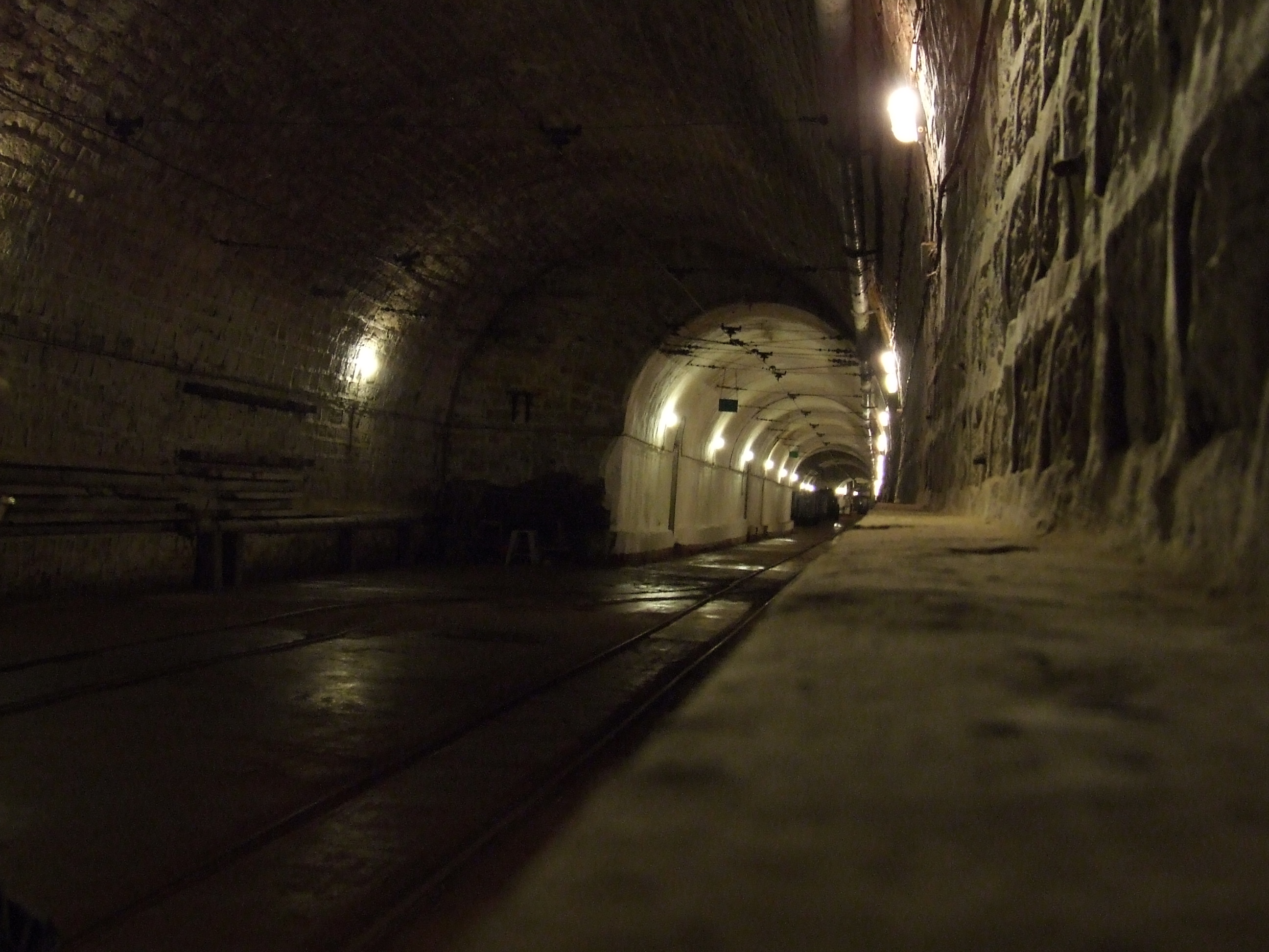 La gare de triage, à l'entrée des munitions. C'est là ou les locomotives diesel étaient changés par des locomotives électriques pour entrer dans le fort.